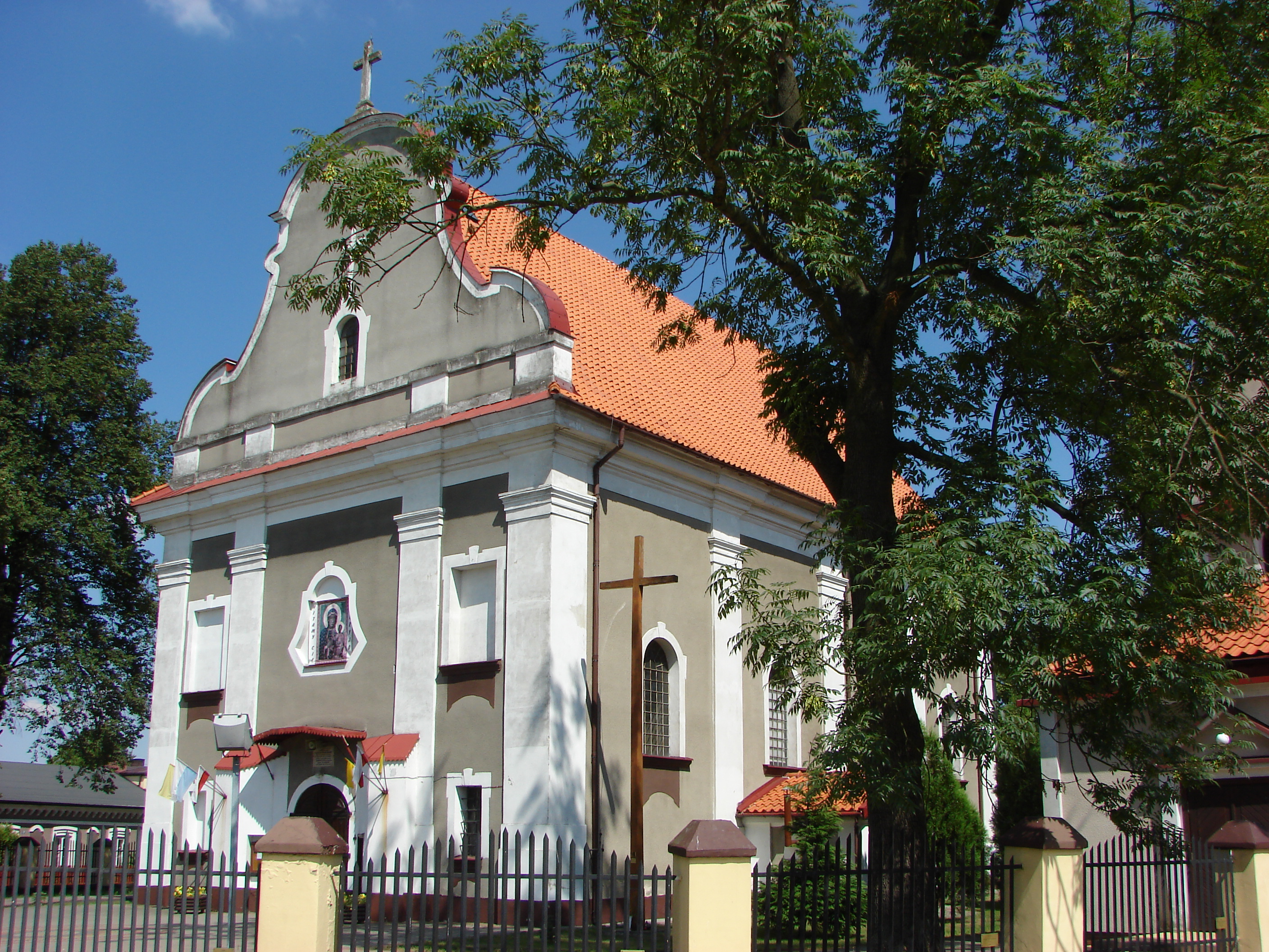 Chlewo 42, kościół św. Benedykta, 1778